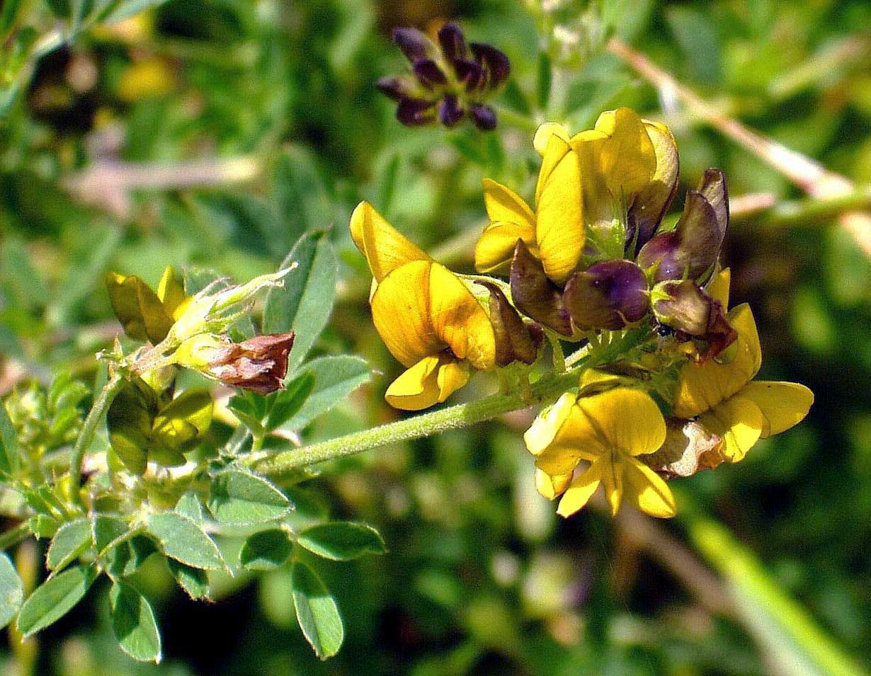 Photographedd in Unterfranken, Germany